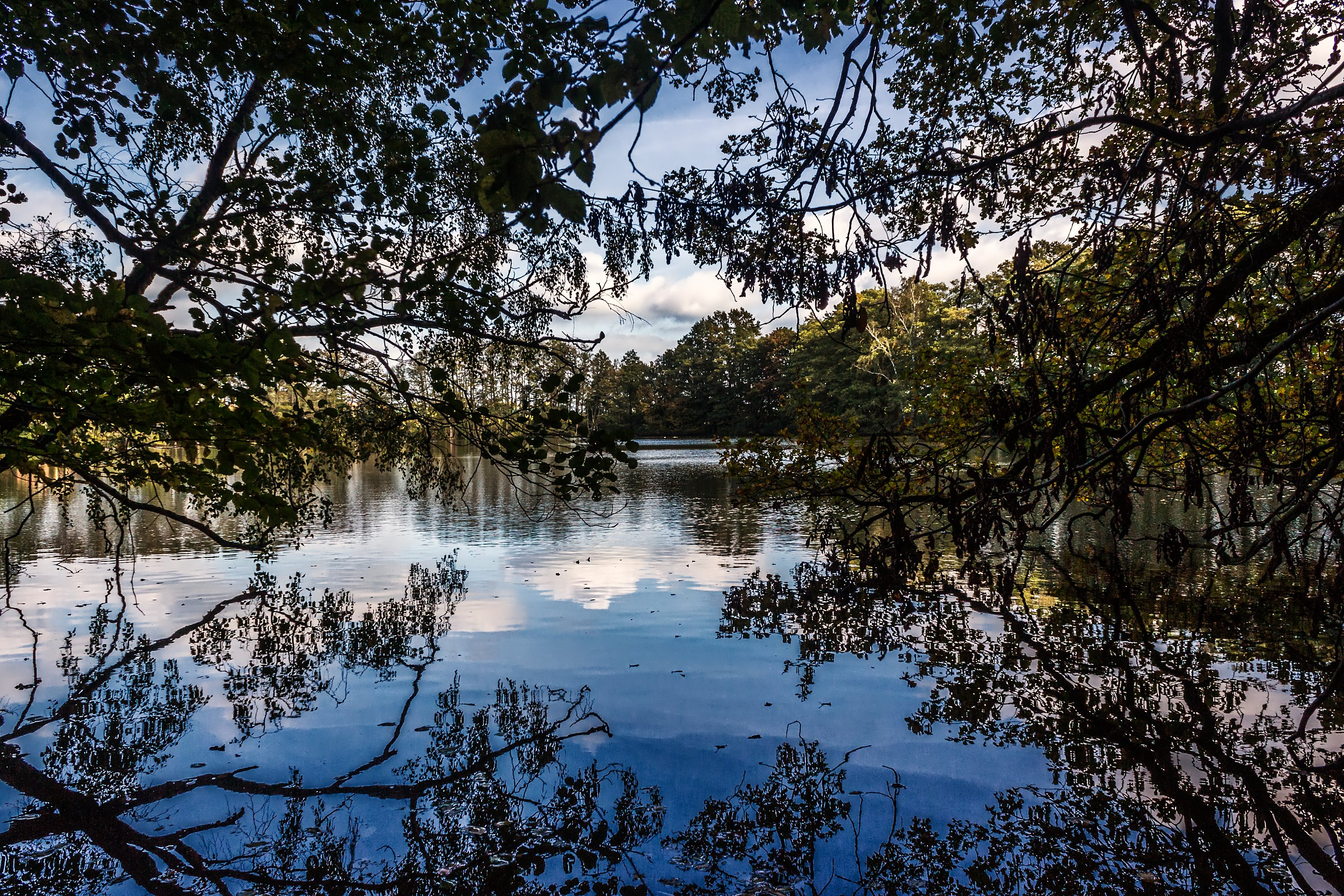 Kleiner Plunzsee am Grumsiner Wald